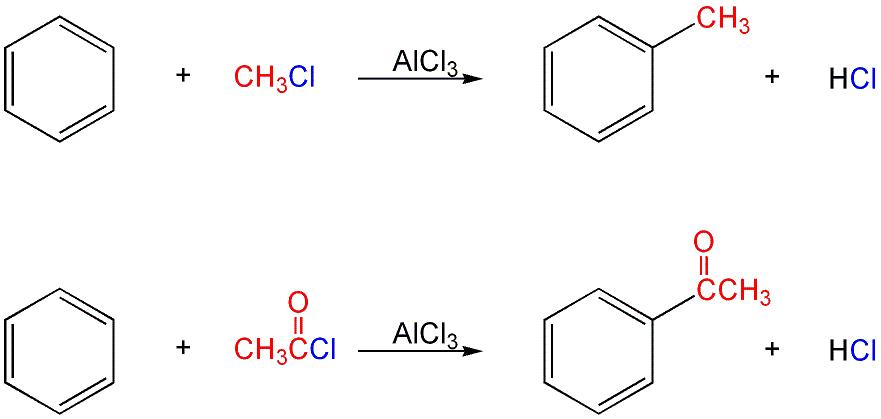 Friedel-Crafts Reaction Picture created by Dice